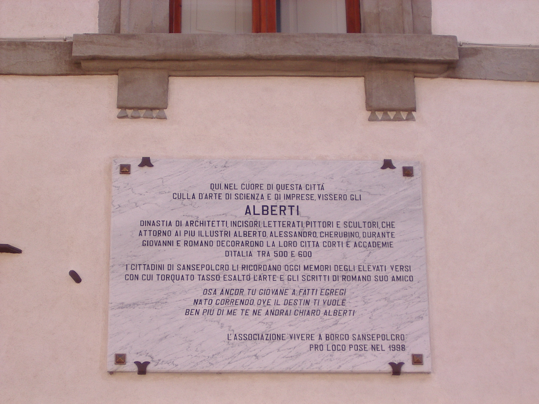 Plaque commémorative sur maison famille Alberti Sansepolcro